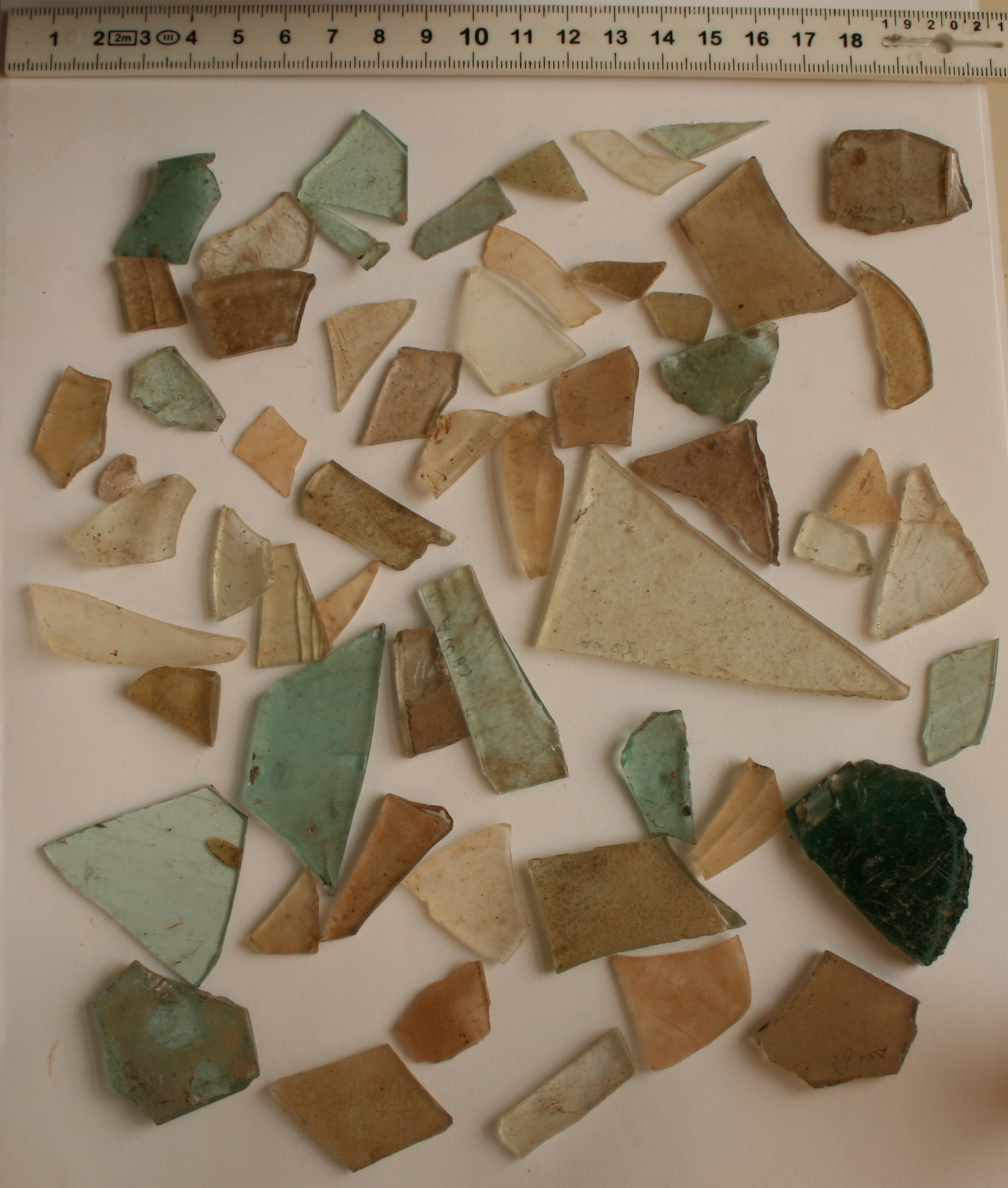 Römische Villa Haselburg im Odenwald (Höchst i. Odw.), Hessen, Glasfragmente, größtenteils Fensterglas